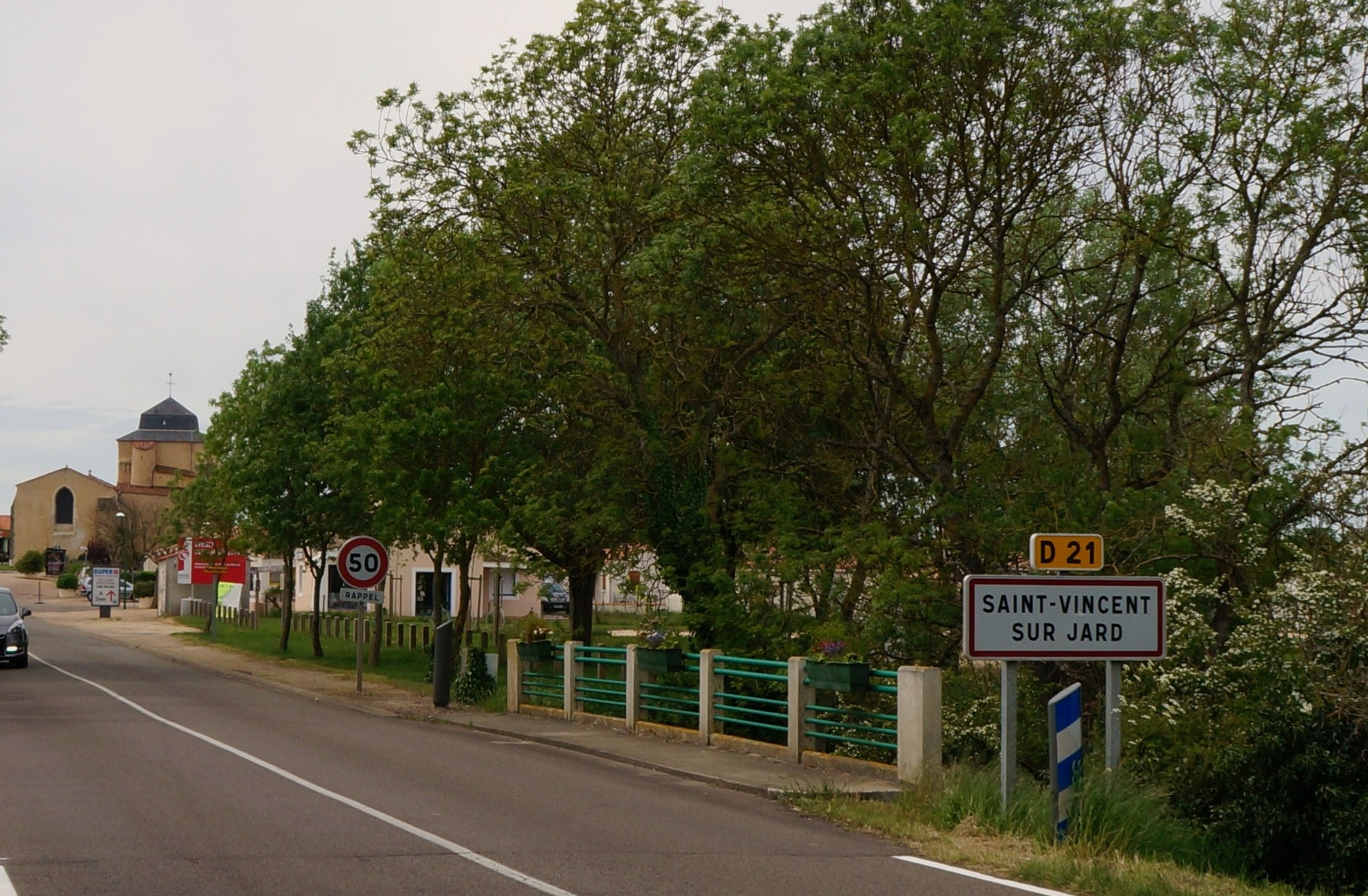 Entrée de la cité Saint Vincent sur Jard, Vendée, France